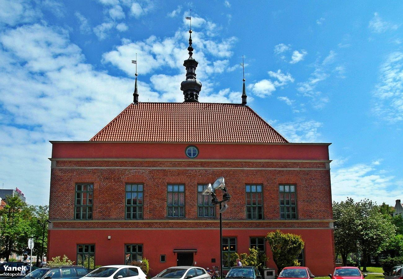 Ratusz Staromiejski widziany z kierunku ul. Elżbietańskiej.